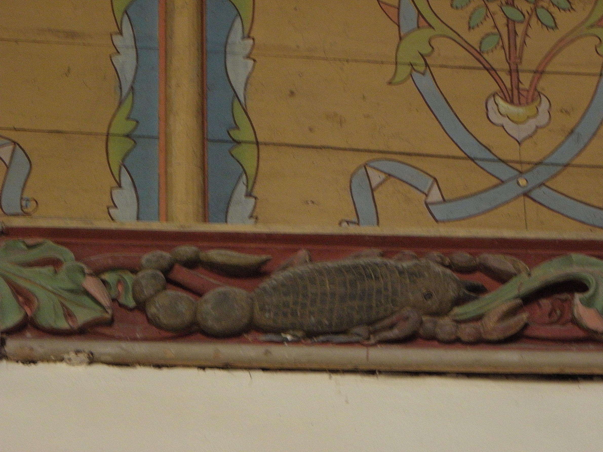 Scorpion. Sablière de la nef de l'église Notre-Dame de Runan (22). .